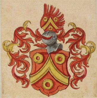 Familienwappen aus den genealogischen Registern der Stadt Schaffhausen, angelegt von Johann Ludwig Bartenschlager (1692–1773) ab 1744, 4. Band (I–L) Familie Jezler